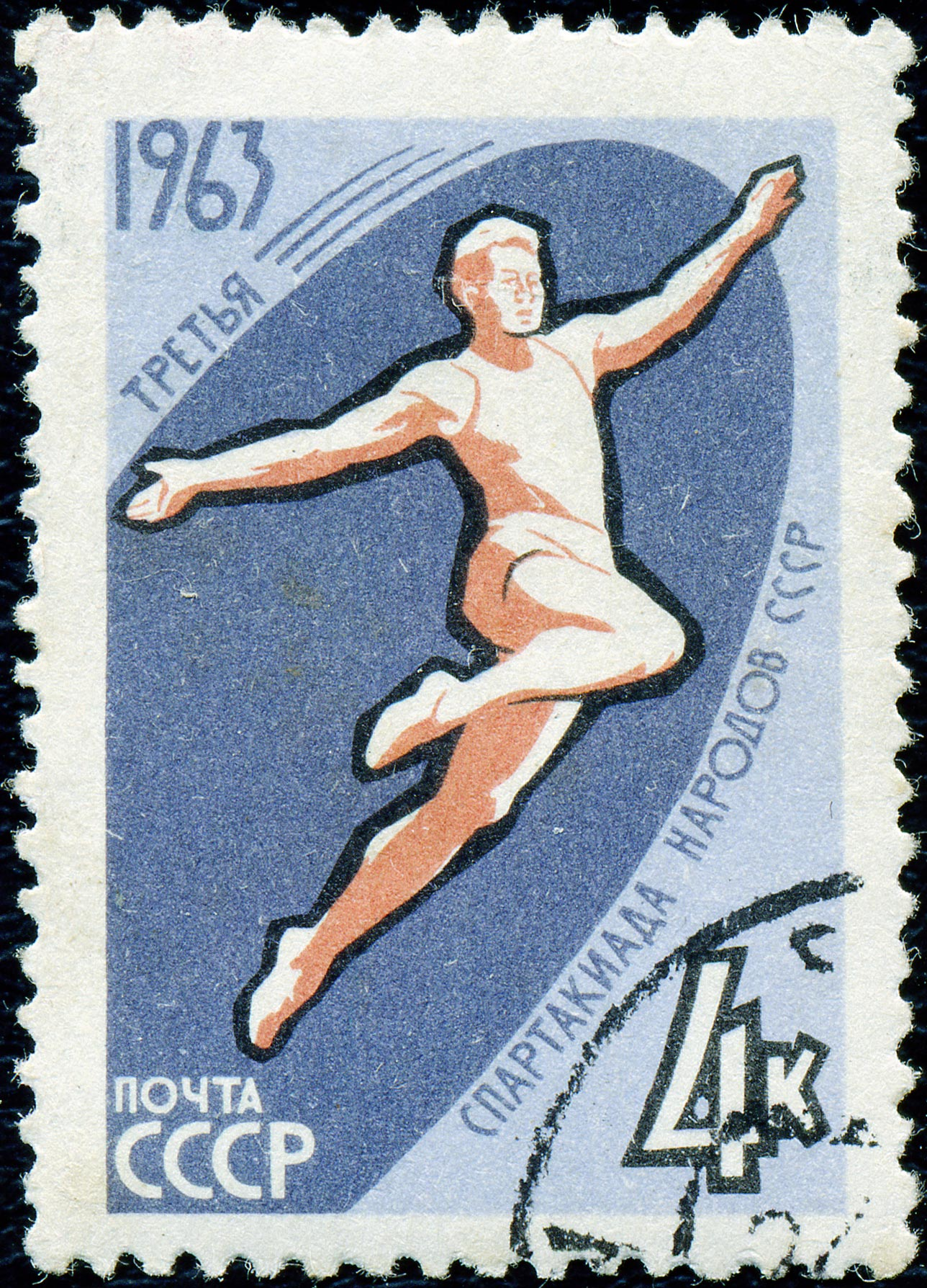 Почтовая марка СССР. 1963. III летняя спартакиада народов СССР. По утверждению исследователя сюжетов на почтовых марках Николая Кочеткова, на ней изображен прыжок Игоря Тер-Ованесяна по фотографии в журнале «Советский Союз», №6 за 1961 год. Подробнее — здесь.